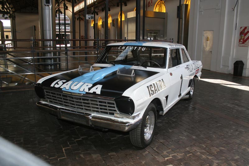 La siguiente es una fotografía del automóvil conocido como Chevitú. La misma fue tomada por Cano, fotógrafo de Argentina y publicada en su sitio web: La misma fue solicitada para su publicación en Wikipedia como lo exigen las leyes de Copyright.